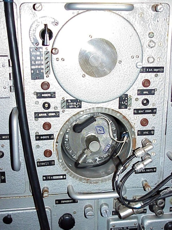 Block 75 des Störschutzsystems der P-18 mit zwei Potenzialspeicherröhren. Von der unteren wurde die Abdeckplatte entfernt.